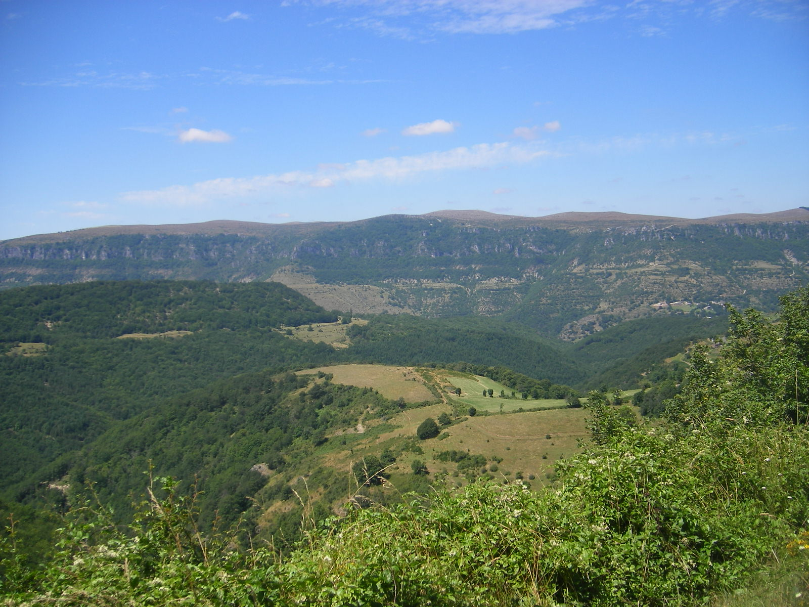 Southern edge of Causse Méjean, view from Nozières (communs Saint-Laurent-des-Trèves)